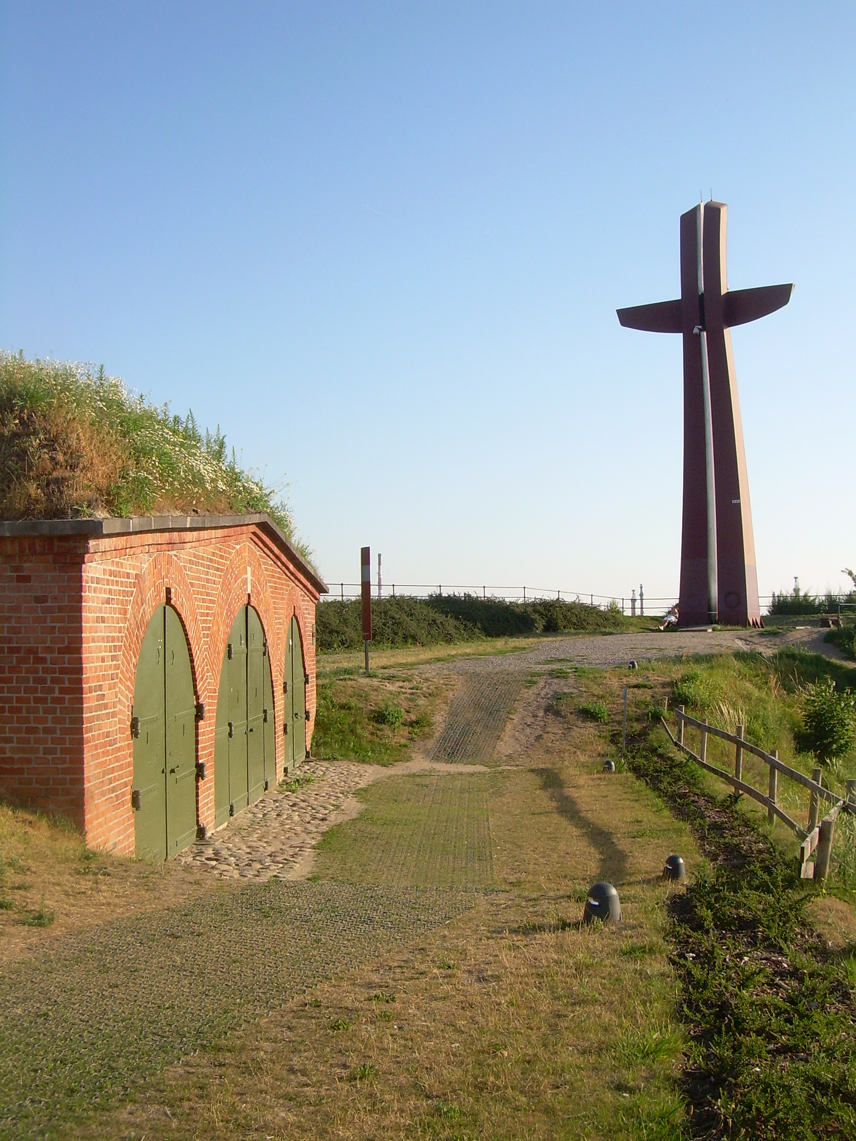 Gdańsk.